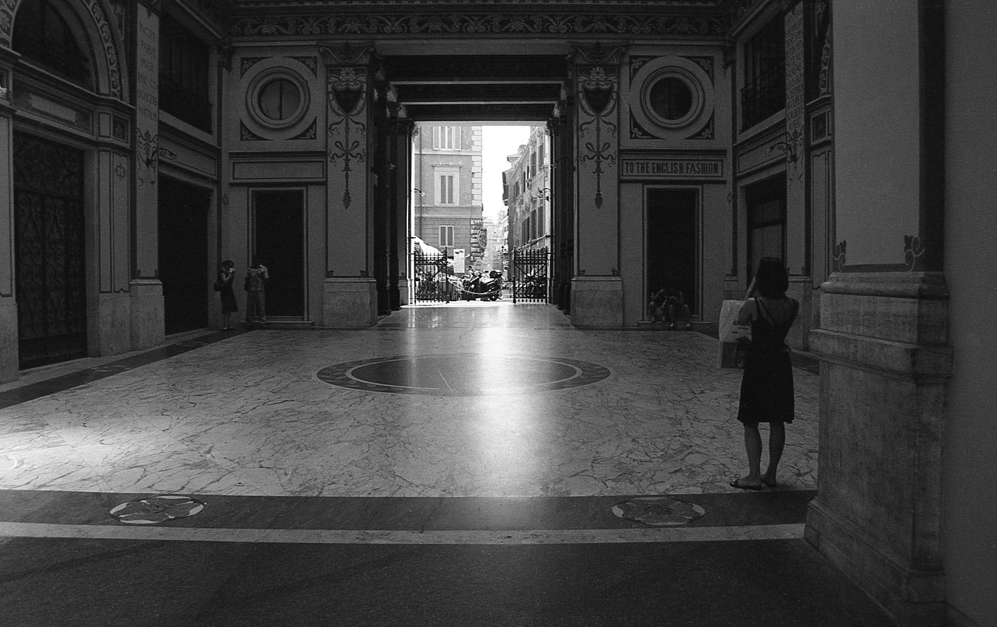 Galleria Sciarra Roma 2012